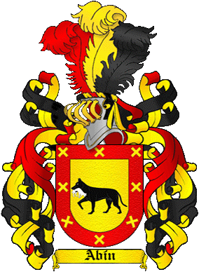 Escudo Noble Abin